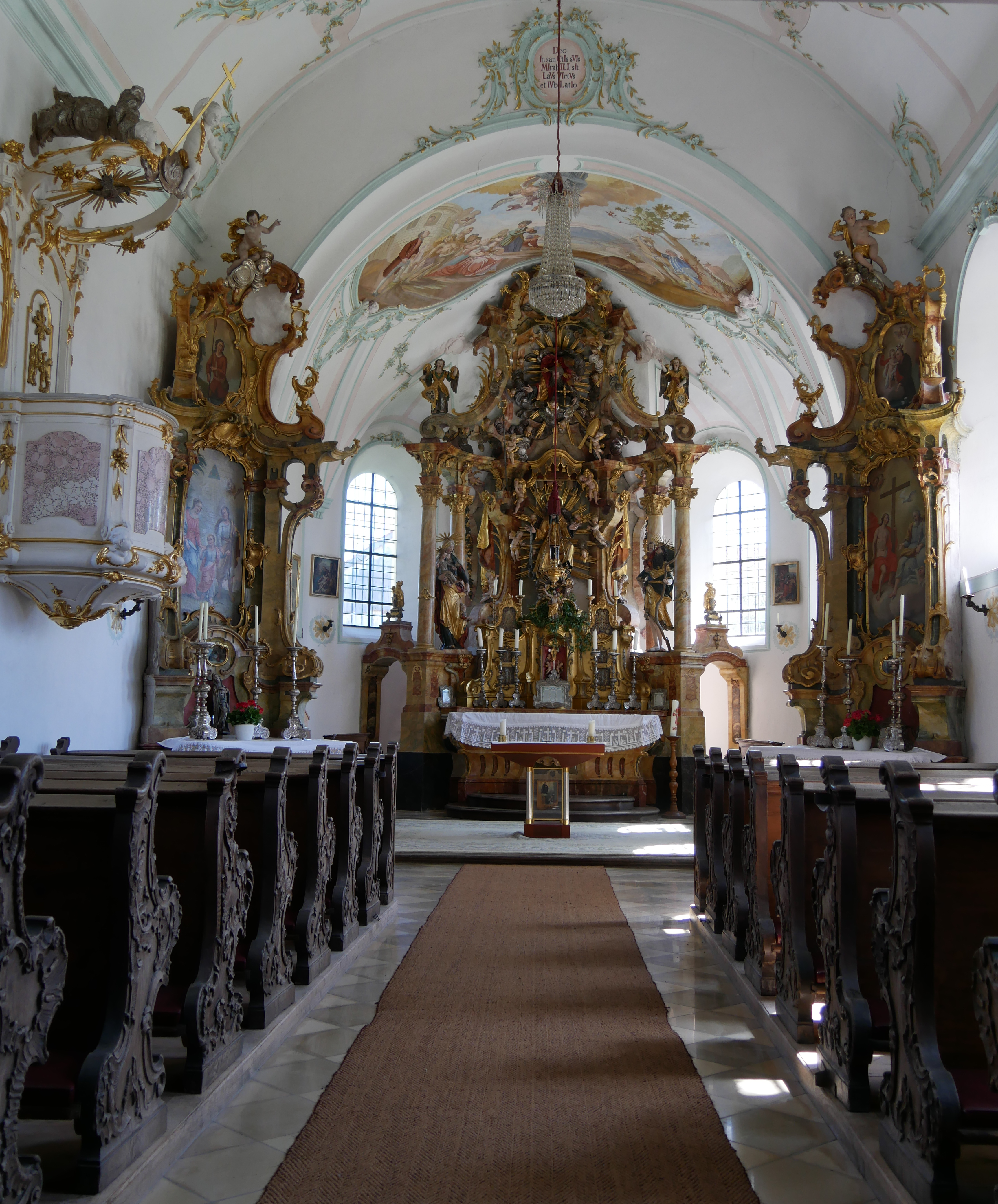 Murnau-Froschhausen, Riegseer Str.4, Kath. Filialkirche St. Leonhard, Innenansicht zum Altar nach Osten